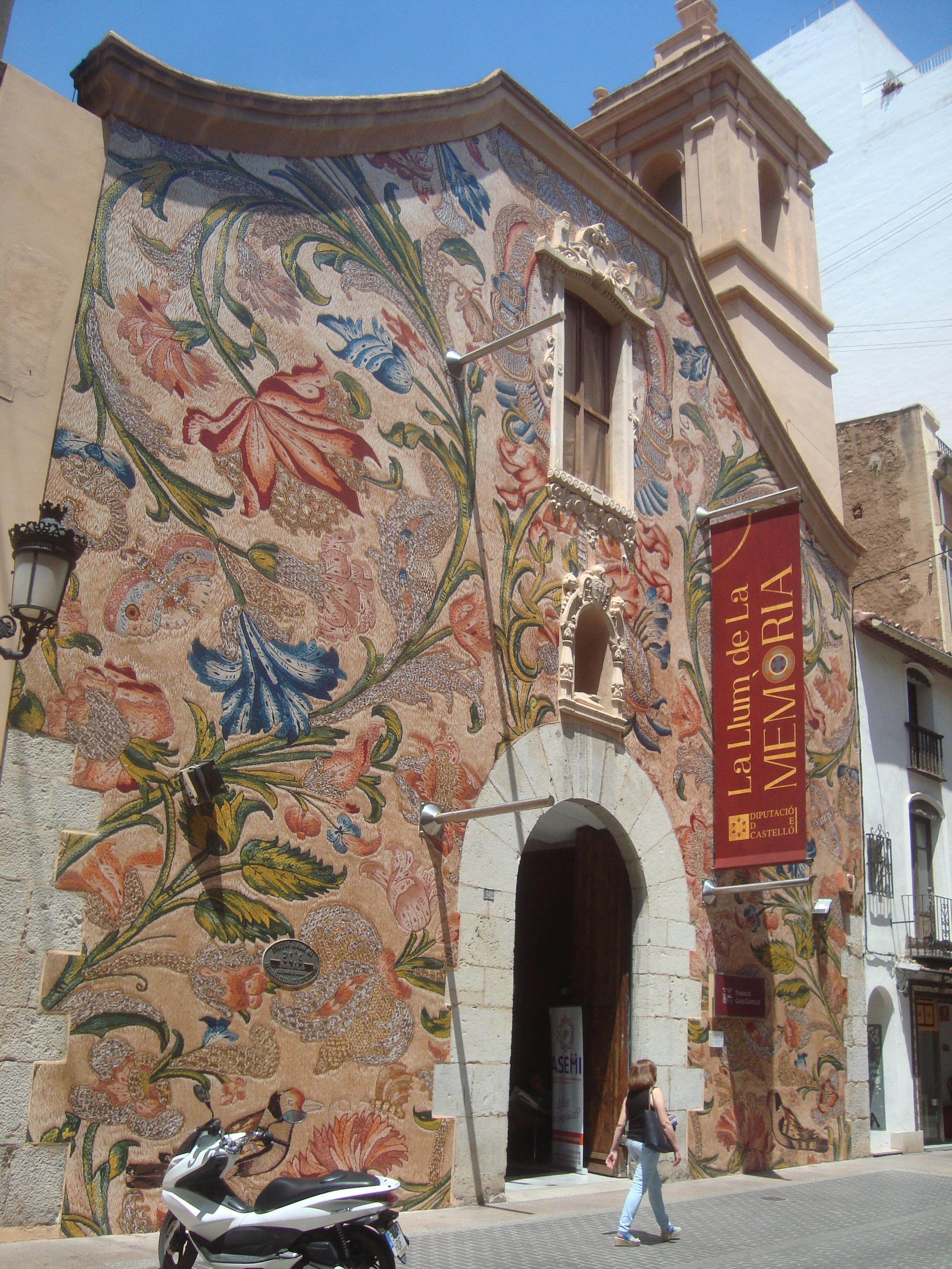 Església de Sant Miquel (Castelló de la Plana) 05.040-012.